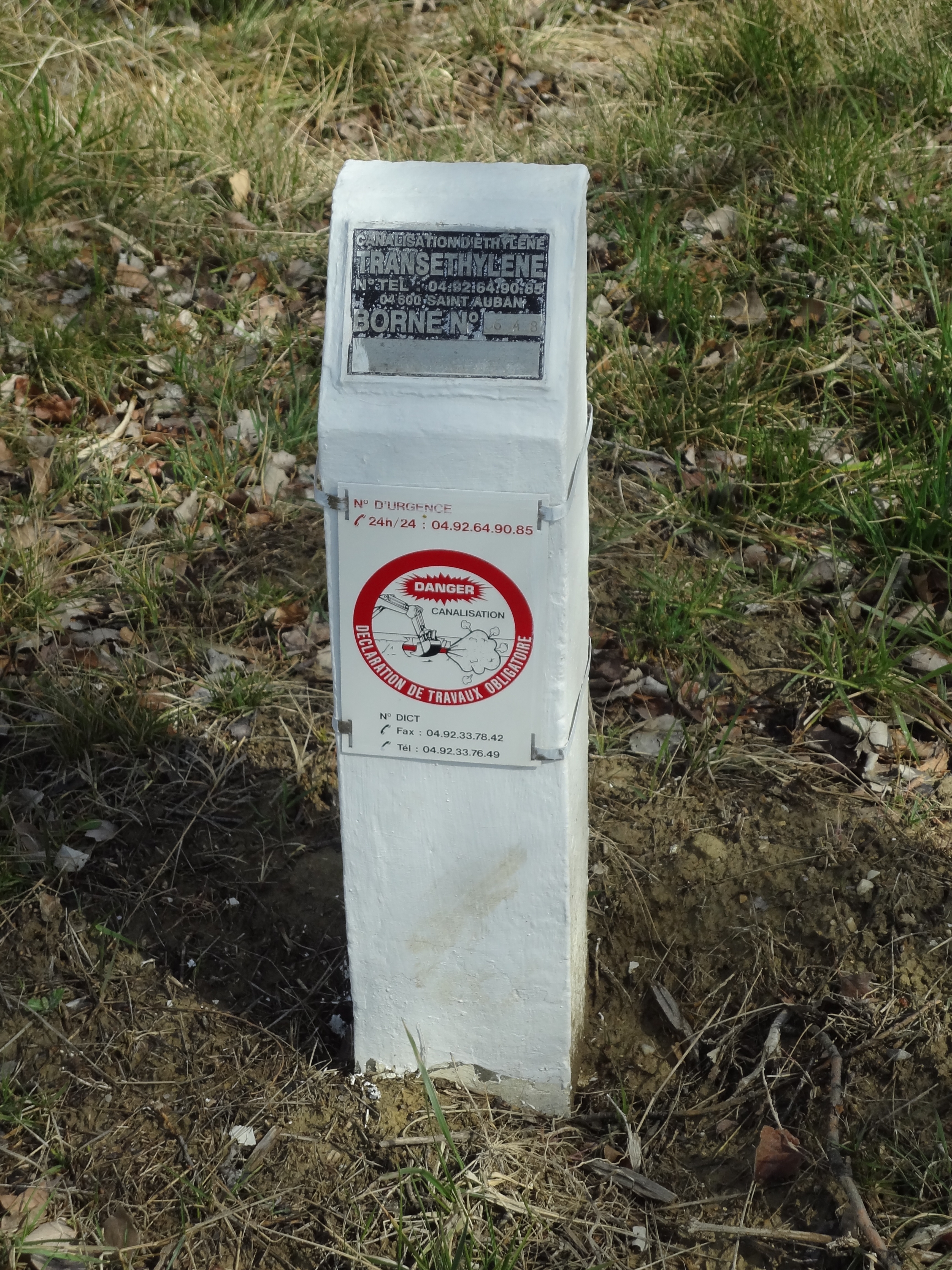 potelet signalant la présence souterraine d’une canalisation destinée au transport d’éthylène, commune de Peyruis